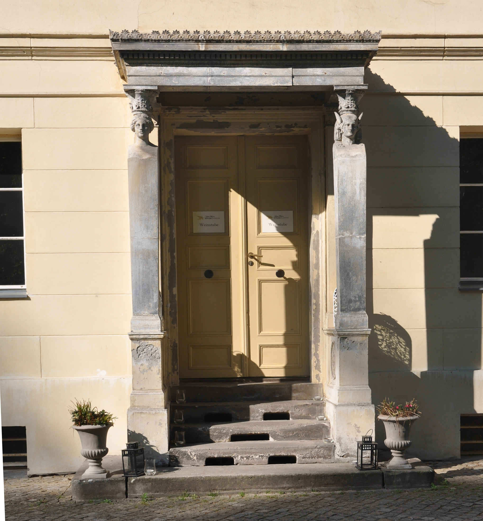 Park Klein-Glienicke, Portalbau der Inspektorwohnung im Kavalierflügel